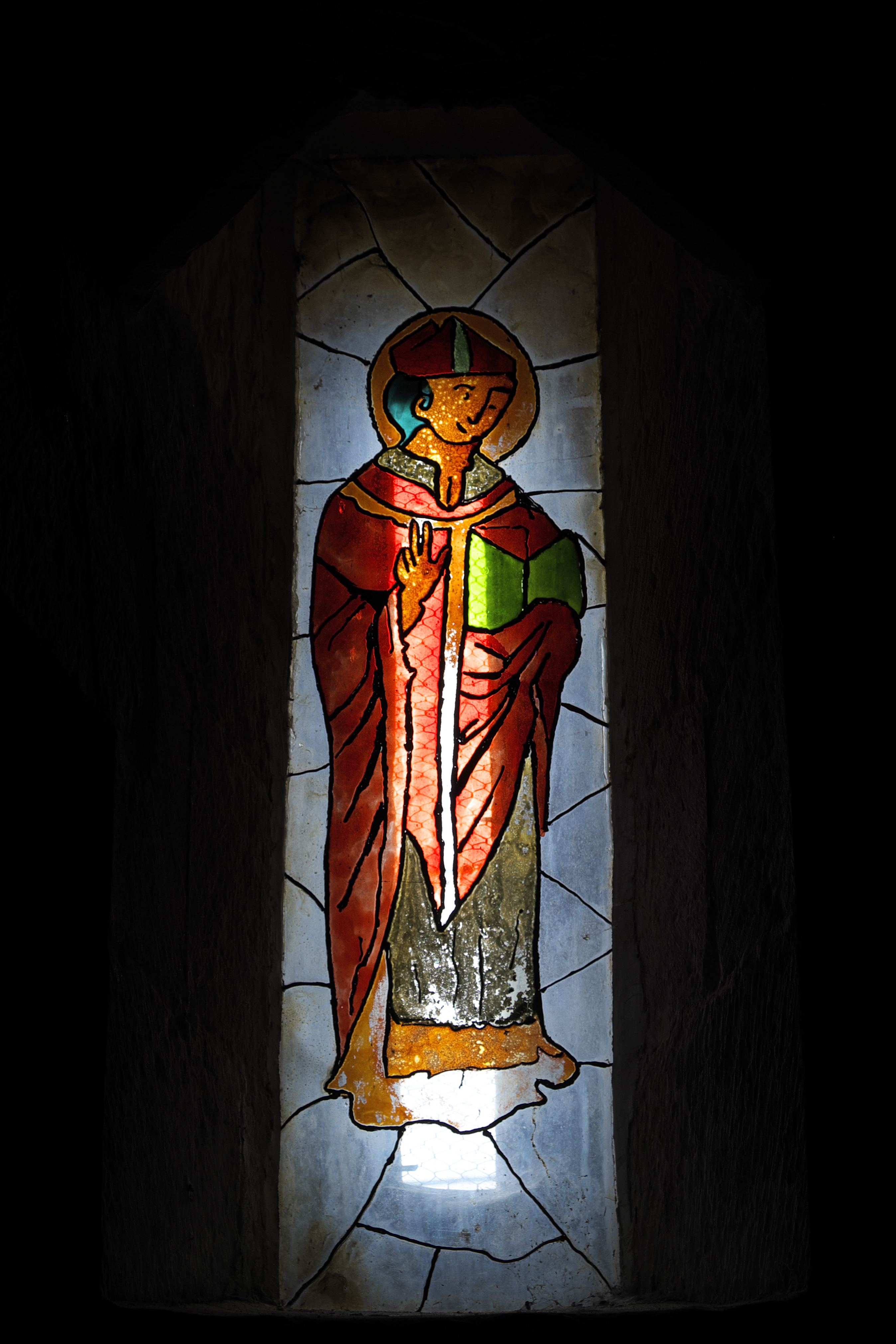 Katholische Pfarrkirche San Fructuoso Mártir in Colmenares de Ojeda (Dehesa de Montejo) in der Provinz Palencia (Kastilien-León/Spanien), Fenster, Darstellung: Hl. Fructuosus von Tarragona